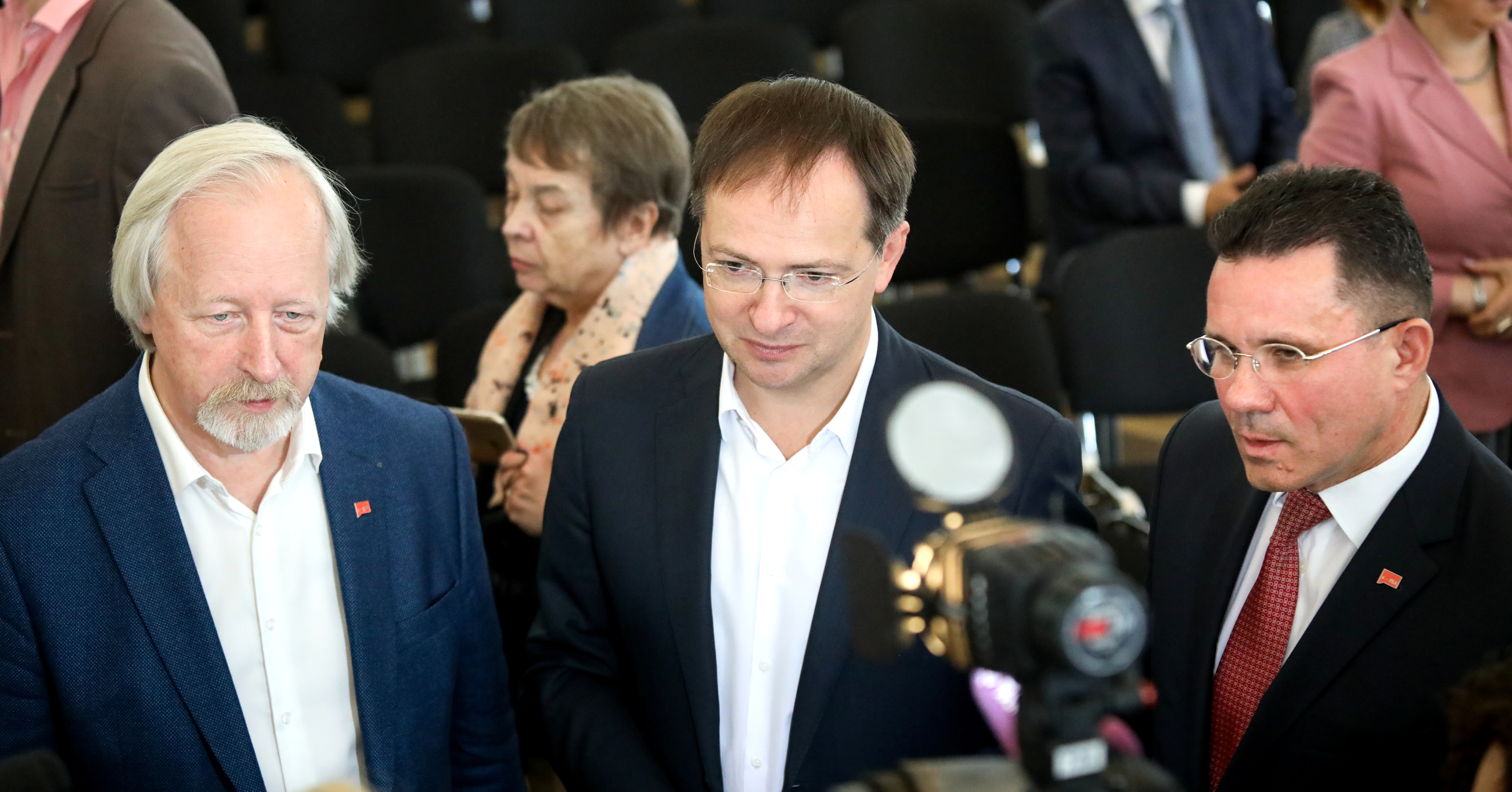 Михаил Афанасьев (президент РБА), Владимир Мединский (министр культуры РФ), Вадим Дуда (директор РГБ) (слева направо). Общероссийский День библиотек 2019 в Российской государственной библиотеке.